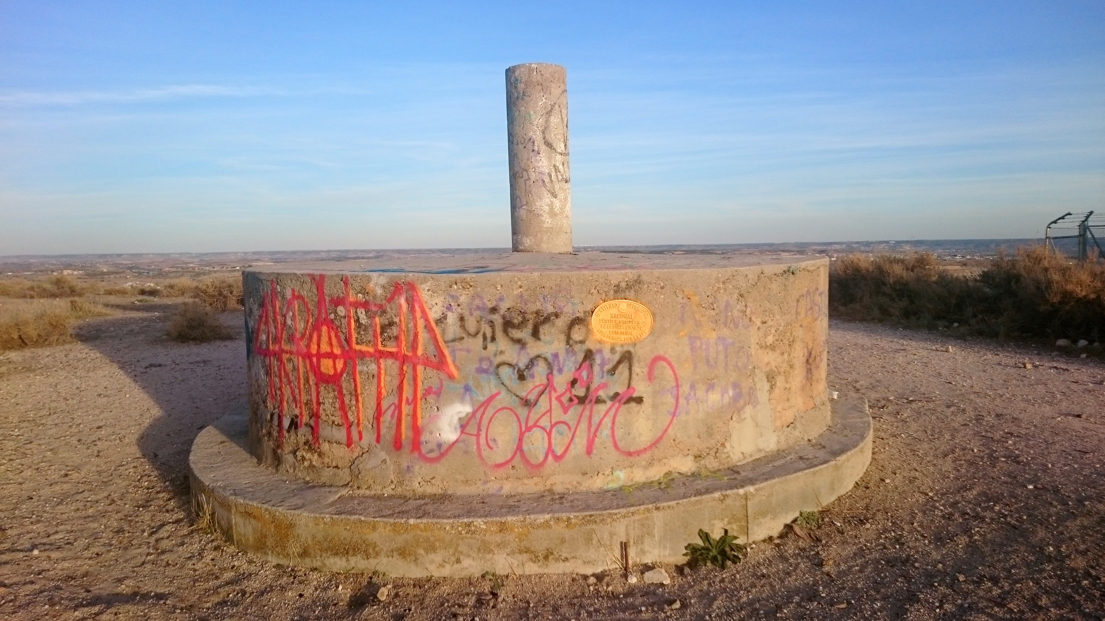 Vértice geodésico en el cerro de Almodóvar de Madrid